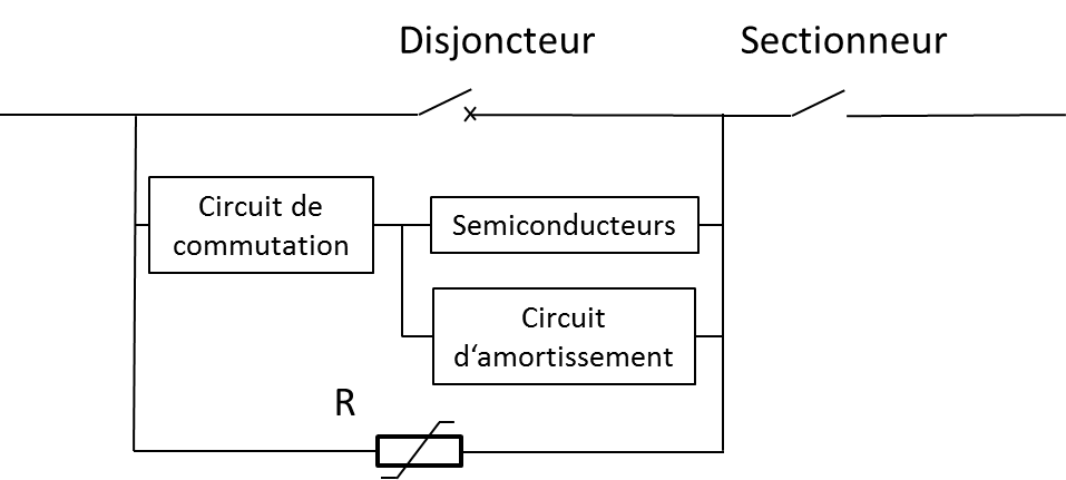 Schéma de principe d'un disjoncteur HVDC hybride comme pensé dans les années 2000.